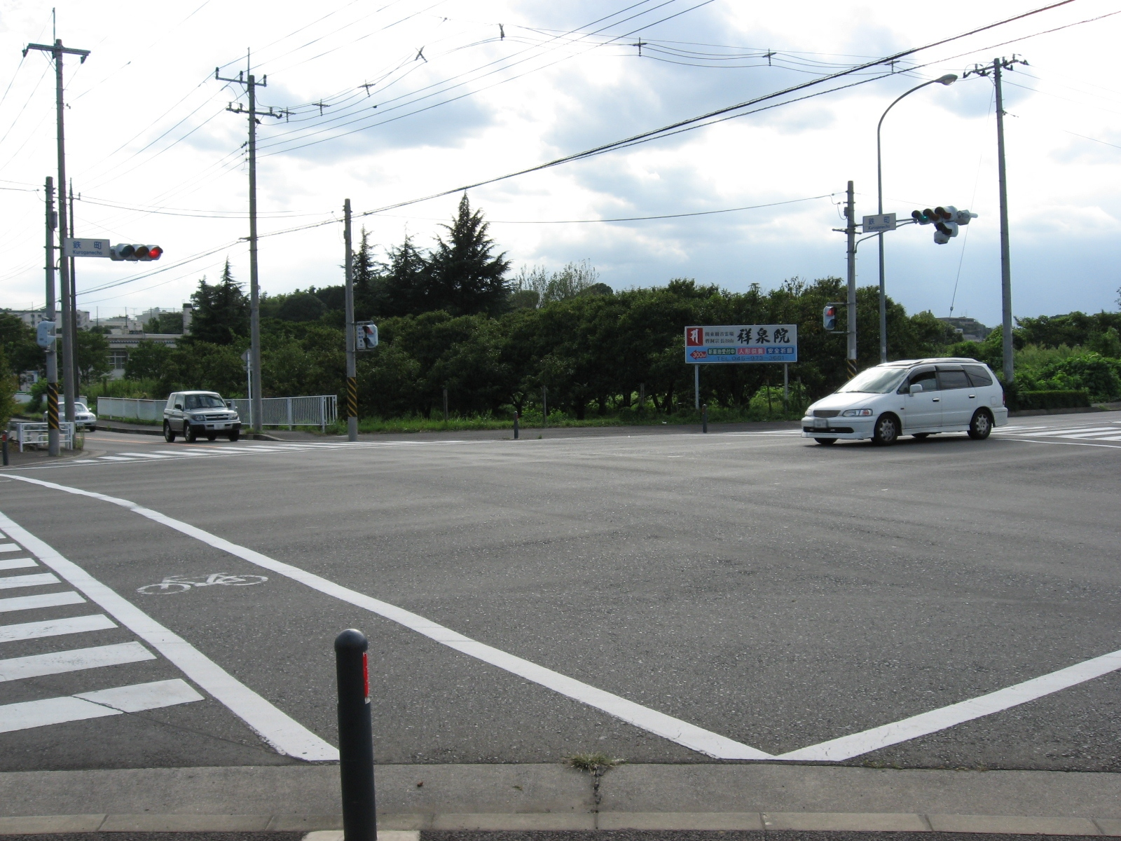 神奈川県道12号（新道）の鉄町交差点